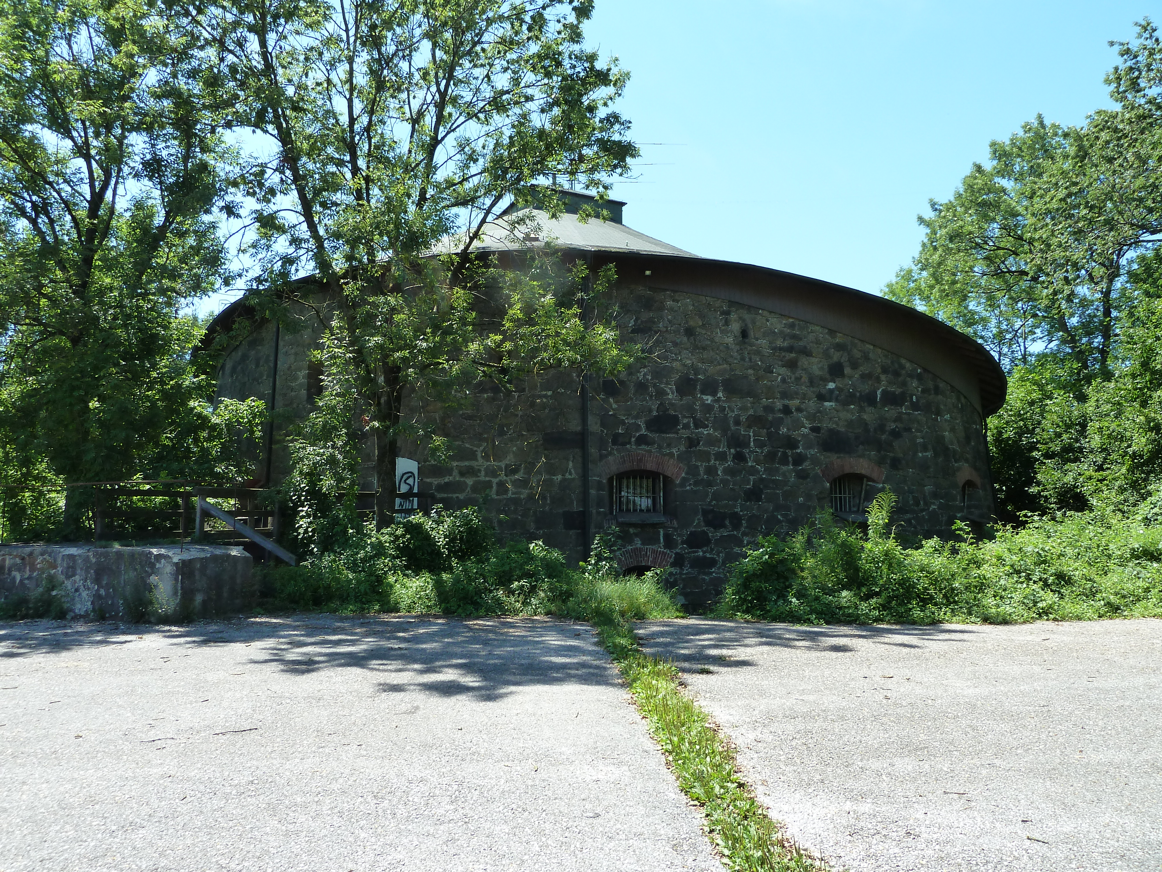 Ehem. Befestigungsturm XIII, Genoveventurm